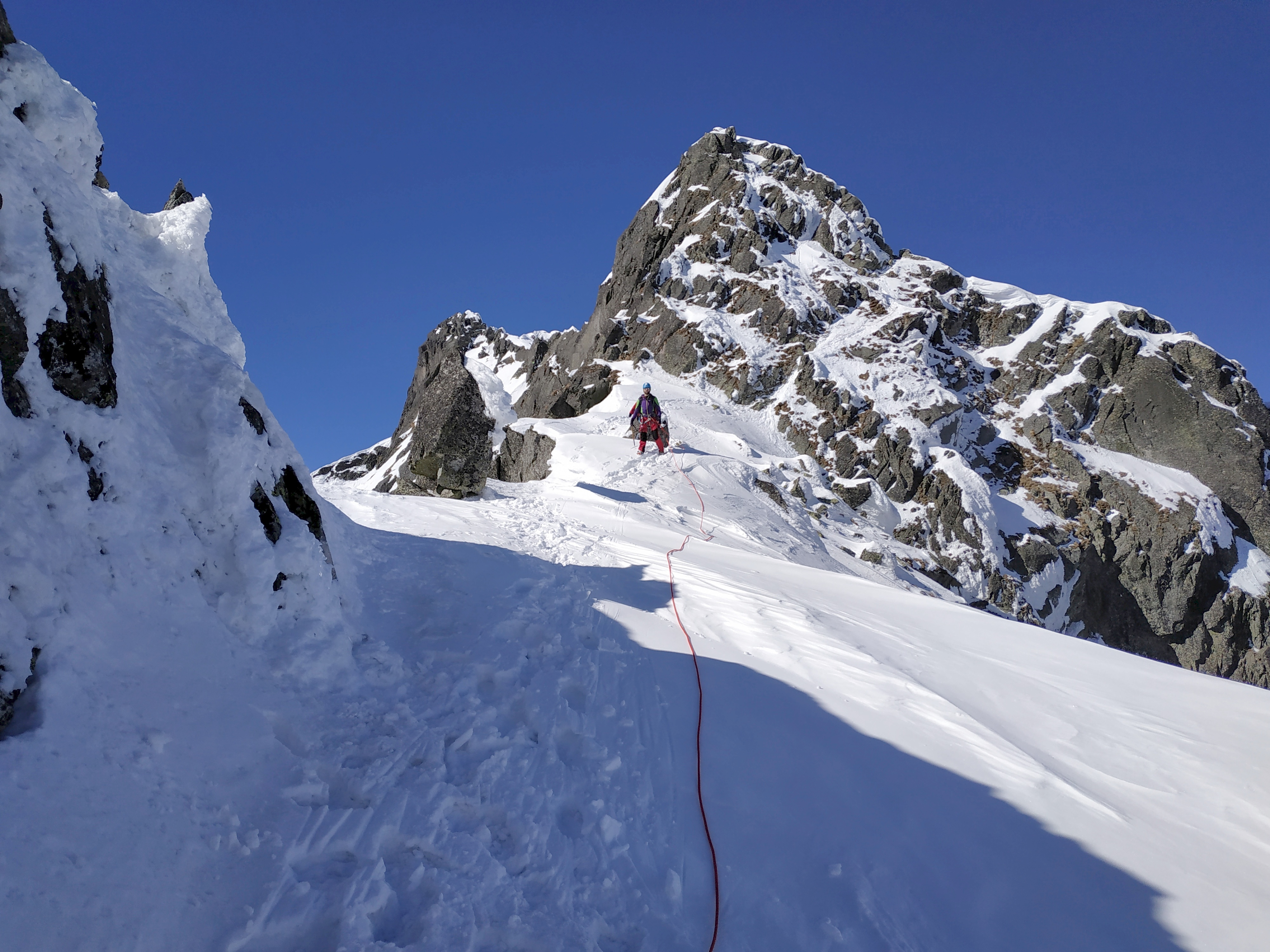 Zmarzła Przełęcz